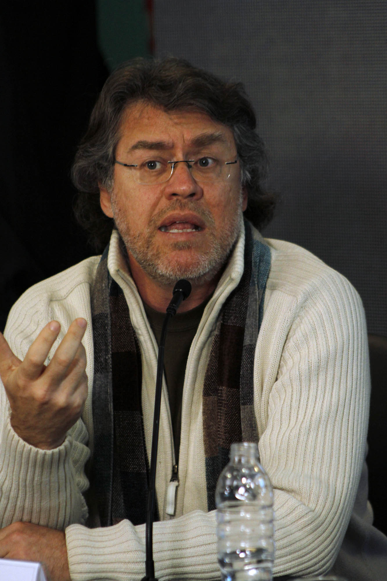 El filósofo argentino, Dr. Ricardo Forster